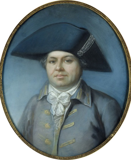 Portrait de Georges Cadoudal (1771-1804)